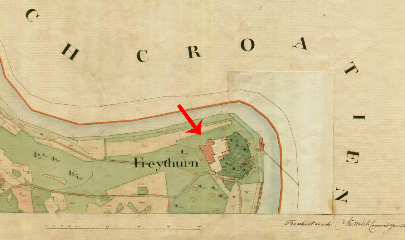 Franciscejski kataster za Kranjsko, 1823-1869